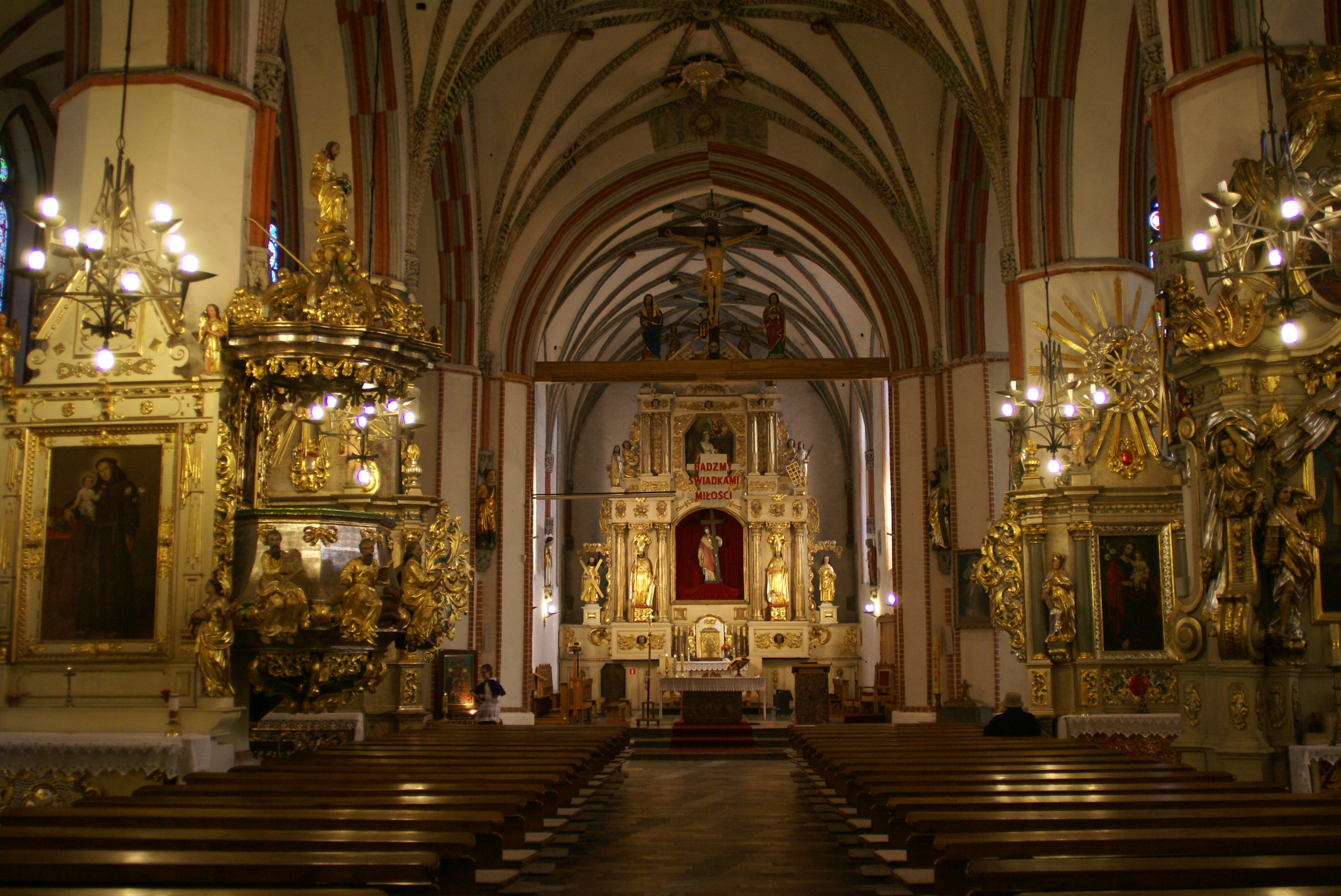 Brodnica, ul. Farna - rzymskokatolicki kościół parafialny pw. św. Katarzyny, 1285-XIV (wnętrze)